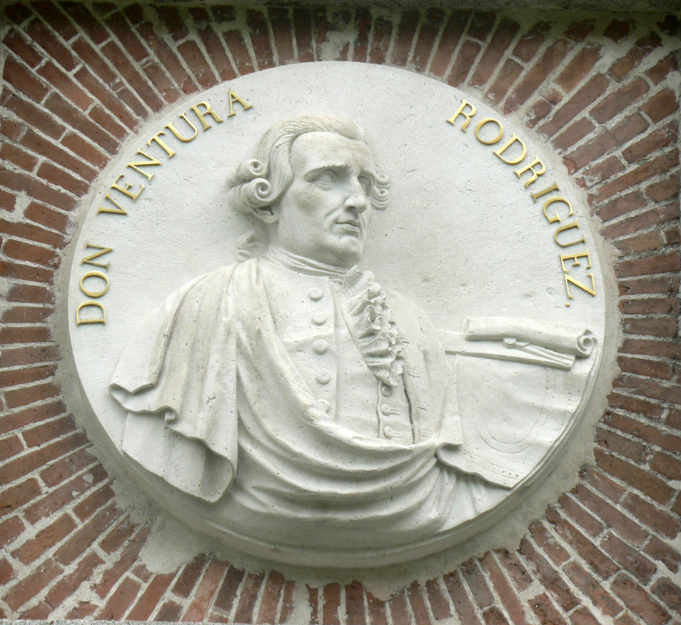 El arquitecto español Buenaventura Rodríguez Tizón, conocido como Ventura Rodríguez, (Ciempozuelos, Madrid, 1717 - Madrid, 1785), Medallón incrustado en la fachada del Museo del Prado, Madrid.